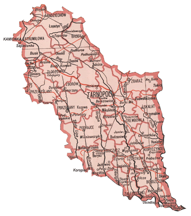 Tarnopol Voivodeship